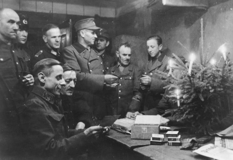 Volkssturm feiert Weihnachten Scherl Bilderdienst: Ostpreussischer Volkssturm feiert Weihnachten Wachfreie Volkssturmmänner bei der Weihnachtsfeier in ihrem Kellerbunker. Die brennenden Kerzen am frisch nach Harz duftenden Tannenbaum geben dem kahlen Raum weihnachtliches Gepräge. Der Zugführer verteilt die soeben eingetroffene Weihnachtspost, die Grüsse von Angehörigen bringt. SS-PK.Kriegsberichter Müller 15.12.1944 [Herausgabedatum]